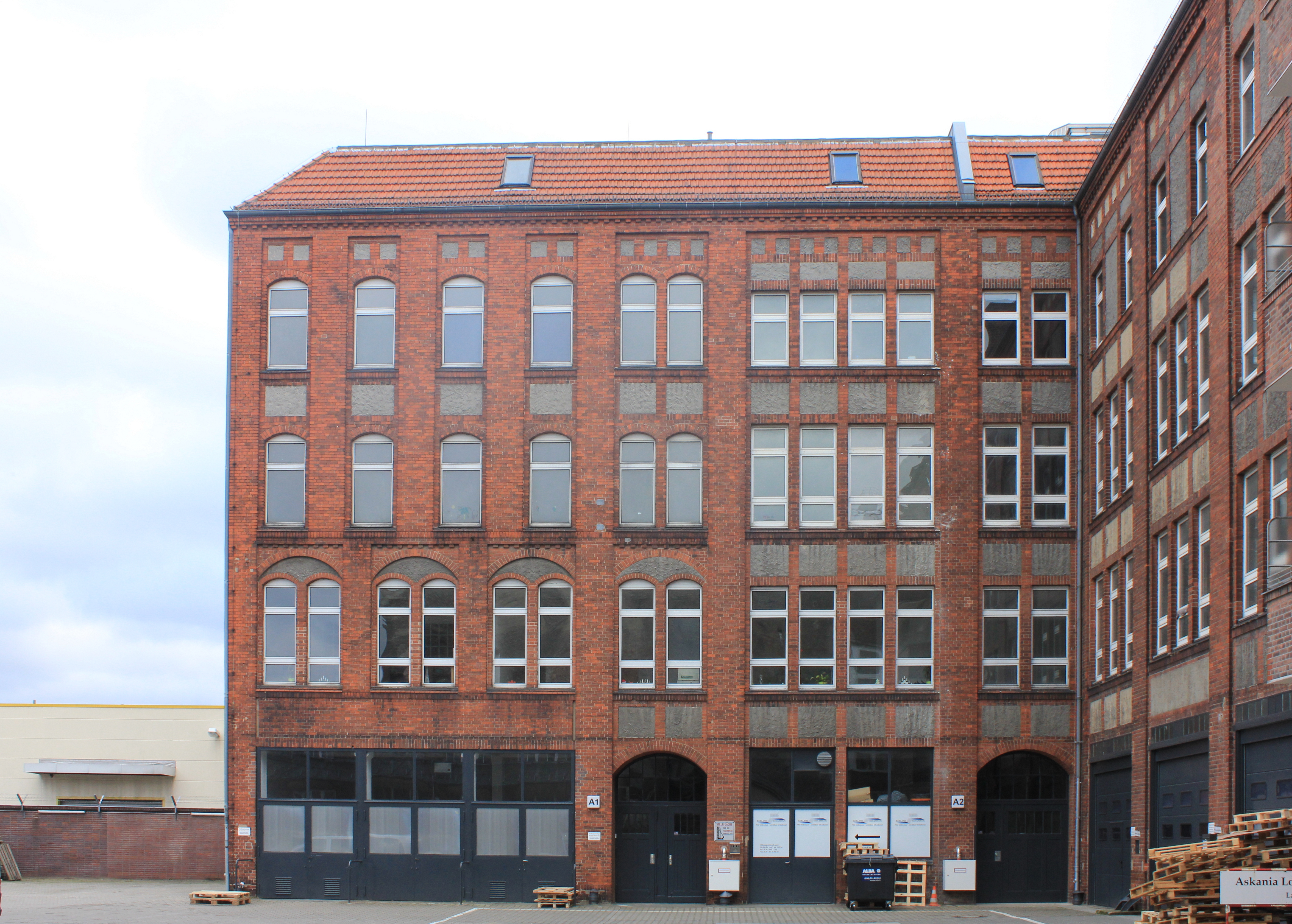 Reichsmonopolverwaltung für Branntwein